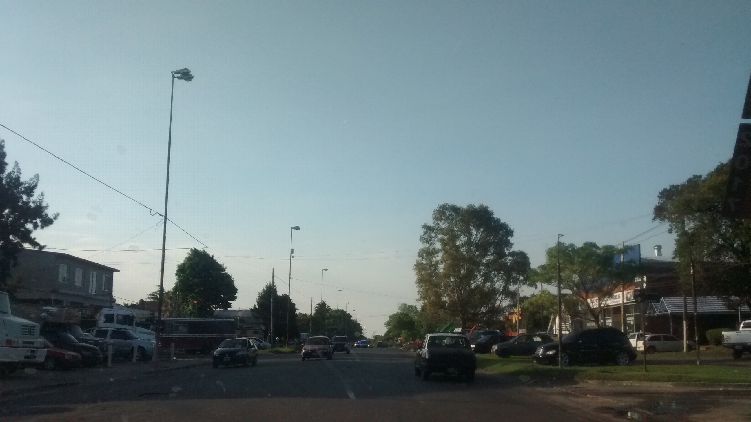 Fotografía de la Avenida General Enrique Mosconi, en el Partido de Quilmes